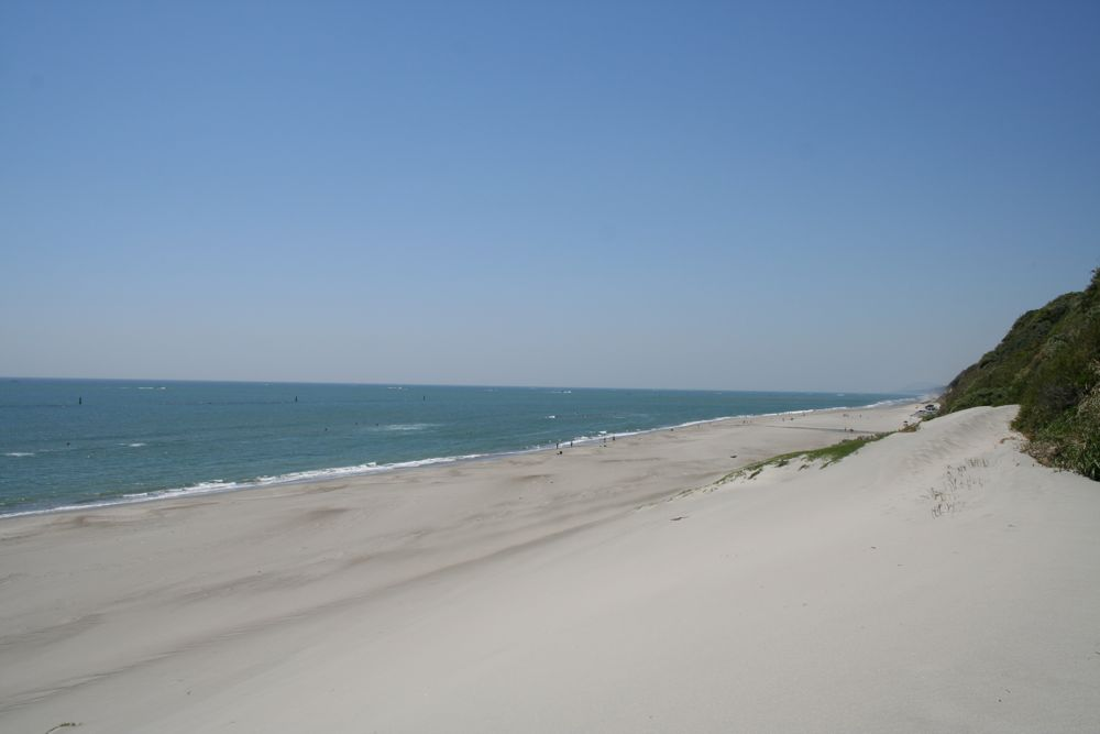 TakatukaBeach